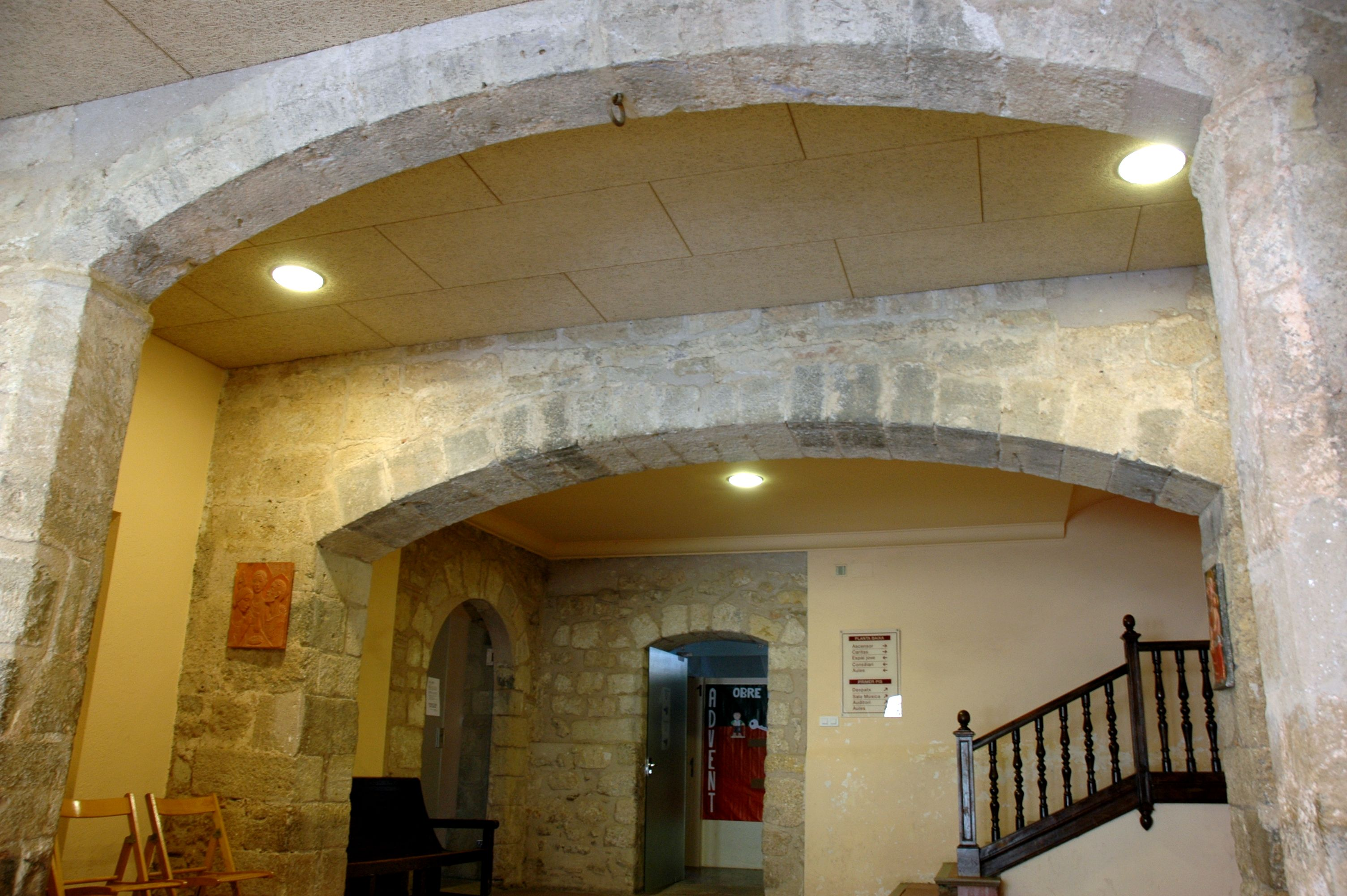 Monestir de Sant Cugat - Palau abacial interior